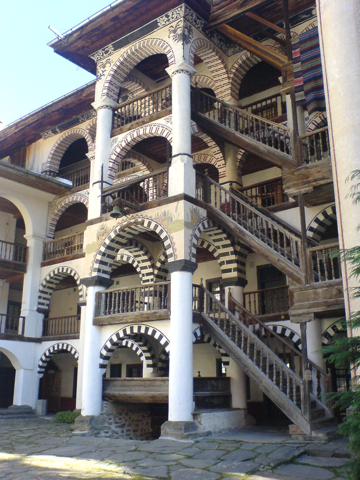 Rila monastery, Bulgaria